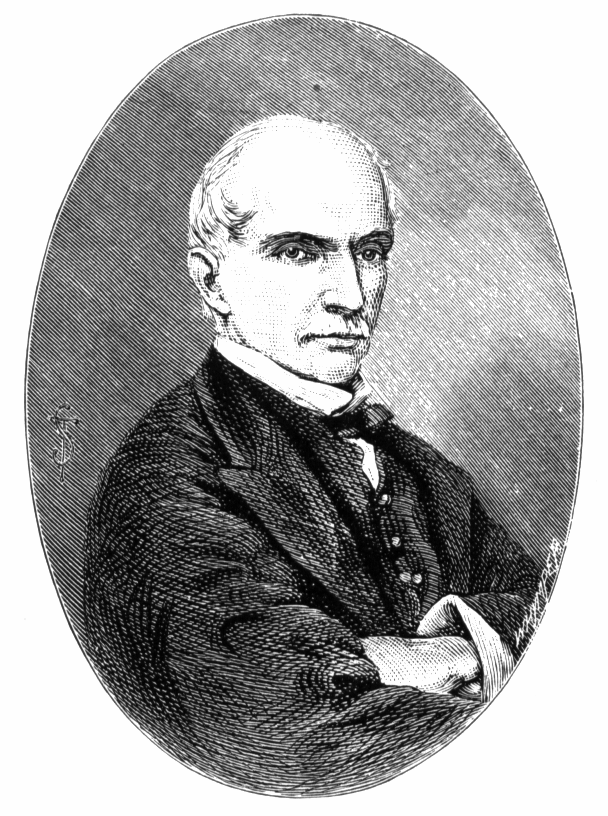 President of Equador Garcia Moreno